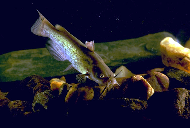 Image Number: 94cs2419 Brown bullhead catfish USDA Photo: Ken Hammond